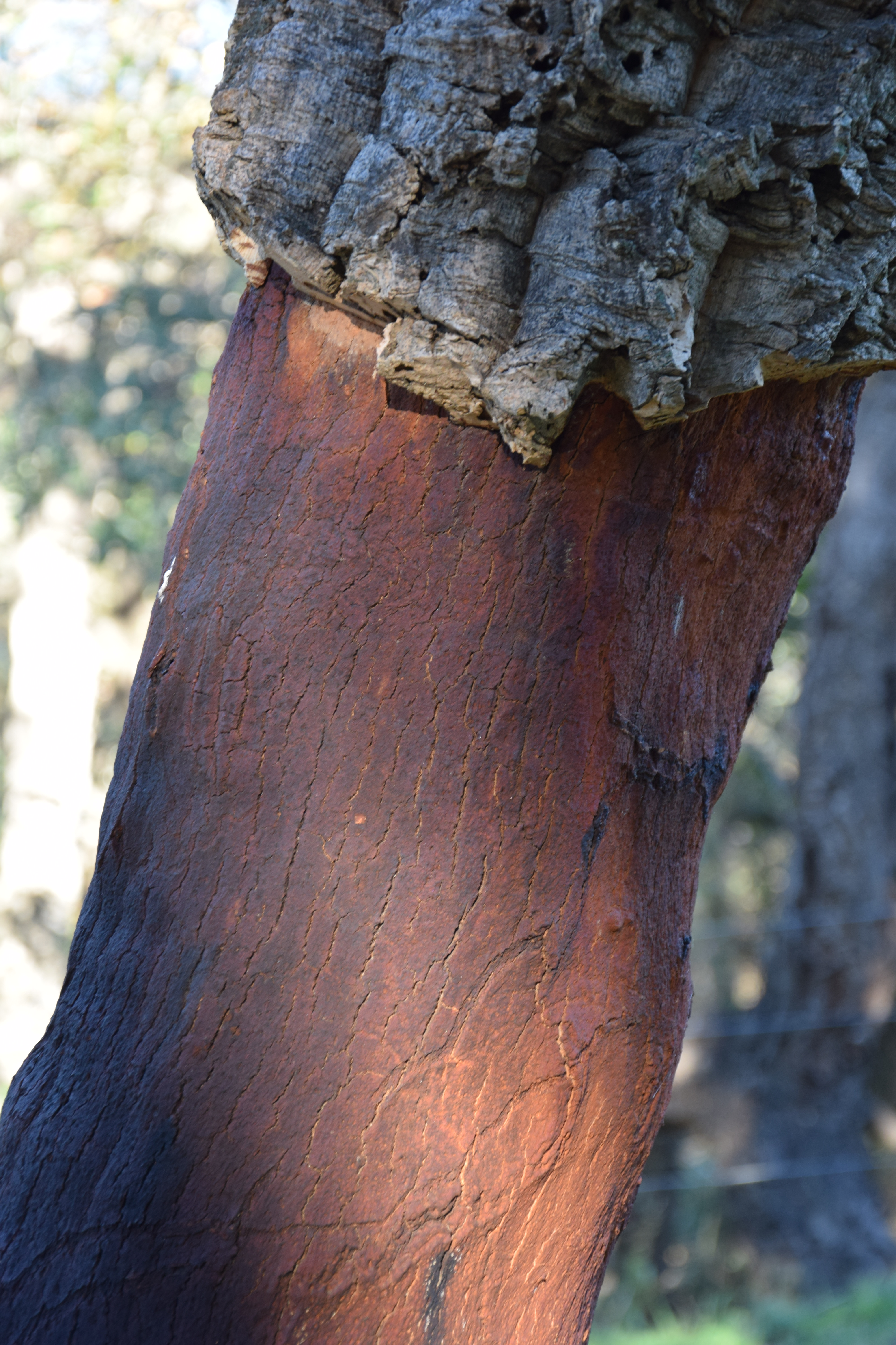 Ствол пробкового дуба после снятия коры. Юг Франции.